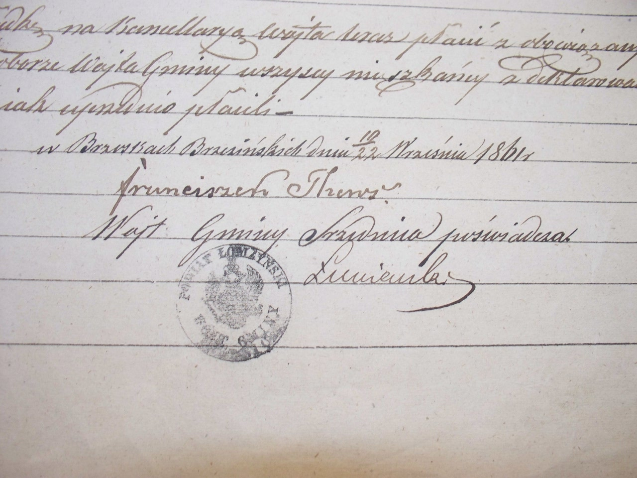 Jest to fragment dokumentu z 10/22 września 1861 roku z widocznym podpisem ostatniego wójta gminy Srzednica – p. Łuniewskiego oraz pieczęcią: Powiat Łomżyński – Wójt Gminy Srzednica z herbem Królestwa Polskiego. Dokument ten został wystawiony w Brzoskach Brzezińskich, jest tutaj również widoczny podpis właściciela ziemi Franciszka Thewsa. Jeżeli chodzi o przynależność administracyjną to obecna Średnica znajdowała się w: Guberni Augustowskiej – Powiat Łomżyński – Okrąg Tykociński – Gmina Srzednica – Parafia Wysokie Mazowieckie. W skład gminy Srzednica wchodziły następujące miejscowości: Brzoski Tatary, Brzoski Stare, Brzoski Gromki, Brzoski Brzezińskie, Brzoski Falki, Srzednica Jakubowięta, Srzednica Maćkowięta i Srzednica Pawłowięta.